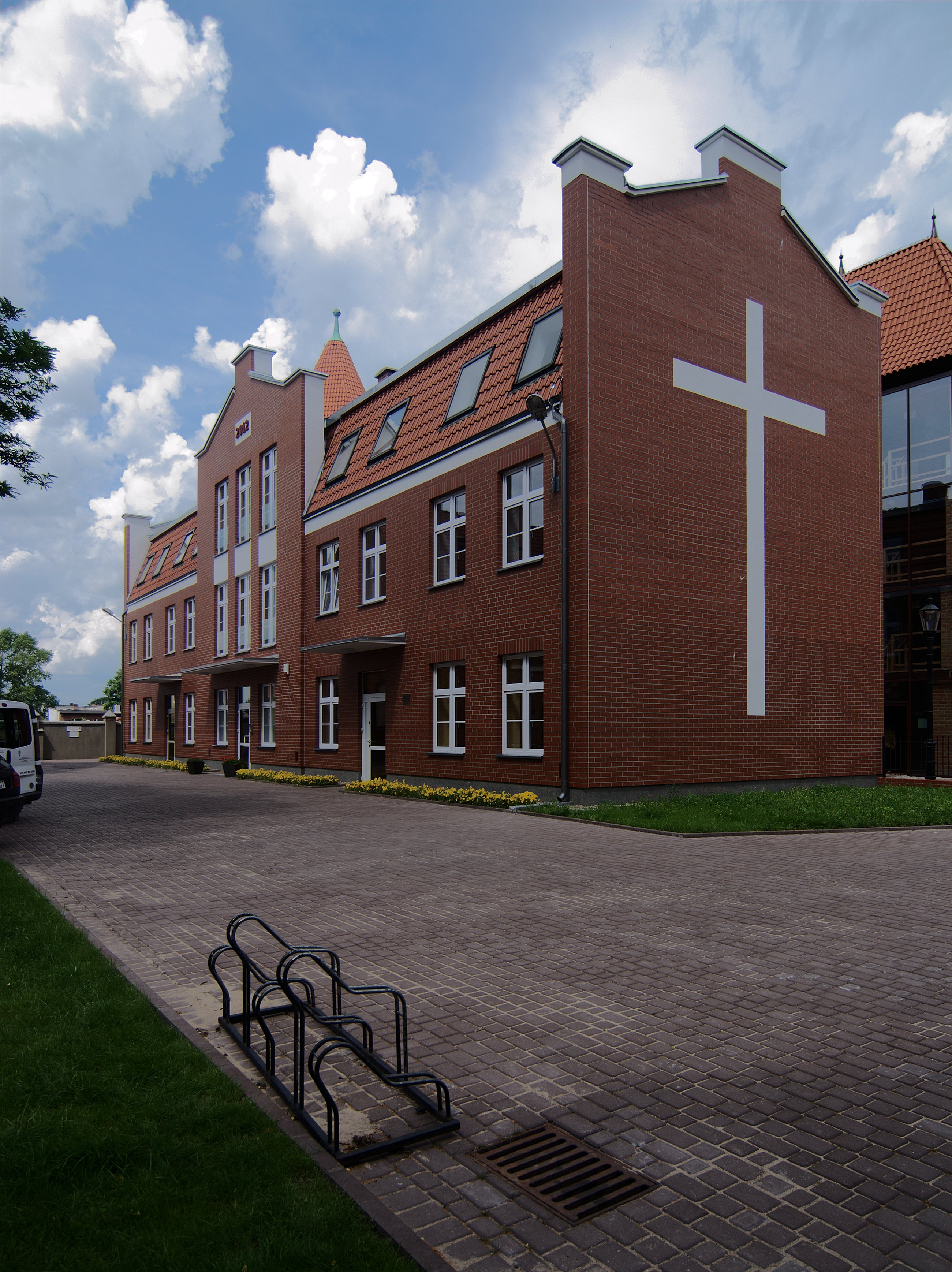 Lębork. Ulica Derdowskiego. Dom Pielgrzyma.